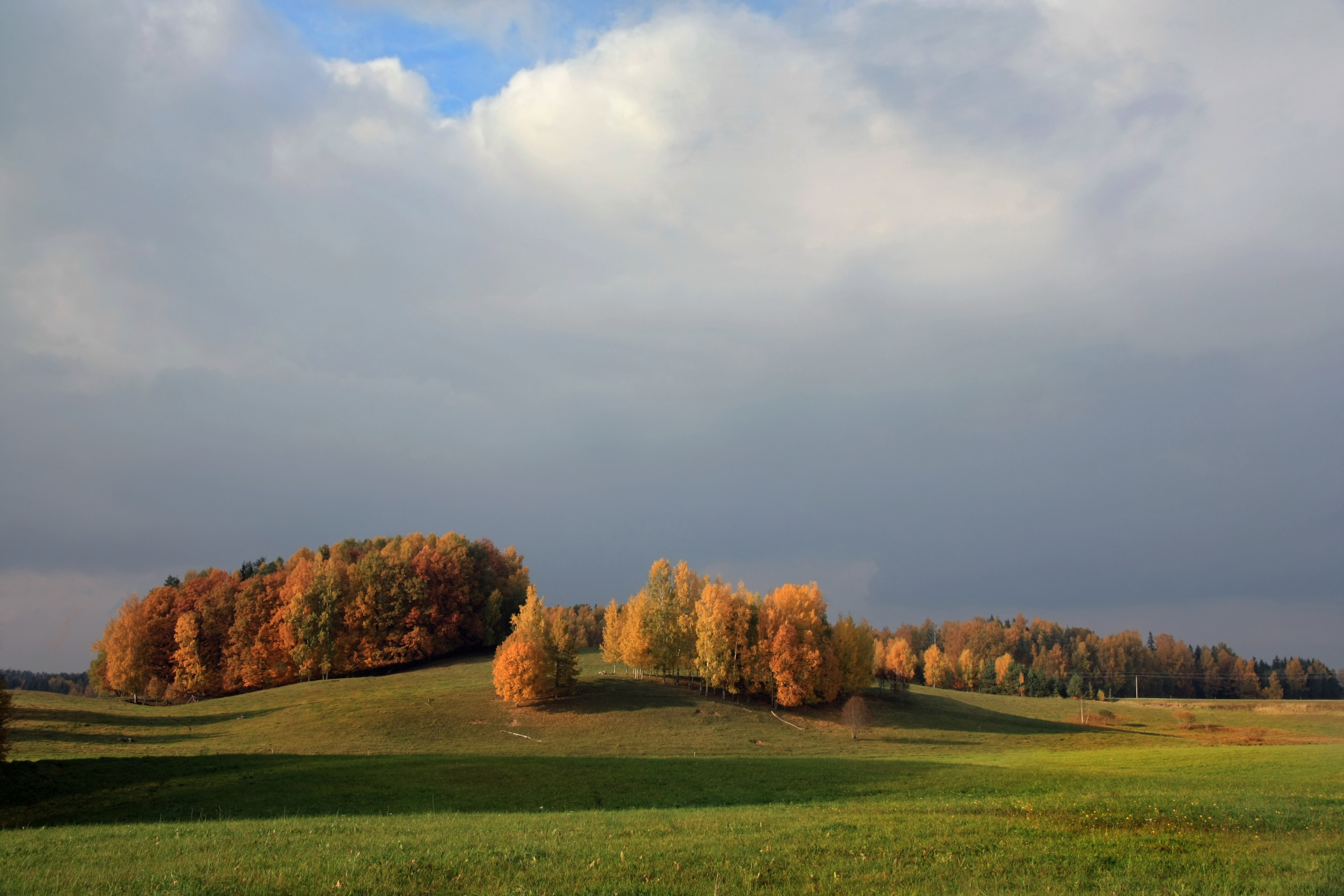 Karula künkad, Valtina